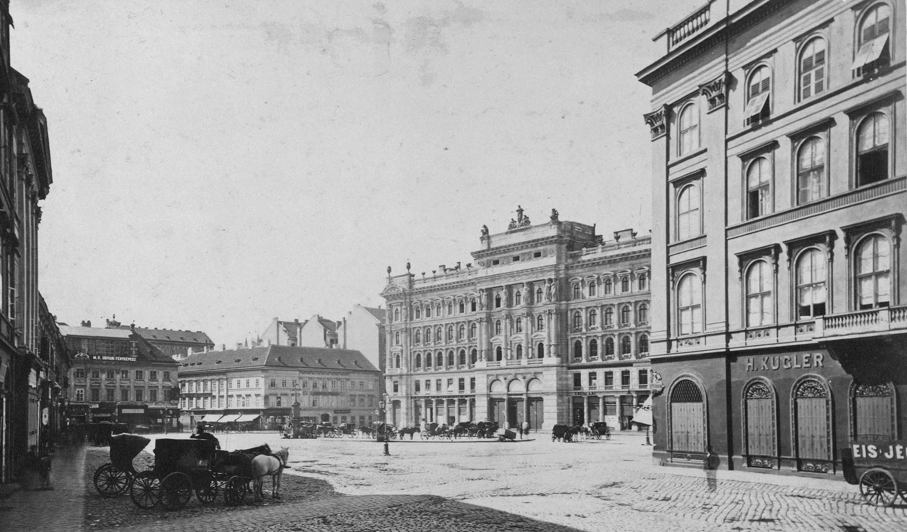 Budapest, Gizella tér, jobboldalon a földszinten a Kugler cukrászda portálja 1875 és 1877 között